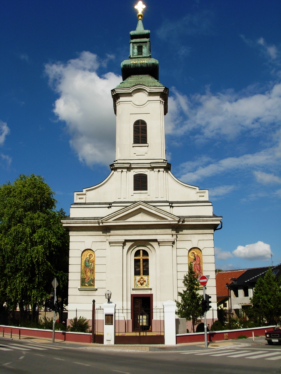 Grkokatolička crkva u Novom Sadu, na uglu Miletićeve i ulice Jovana Subotića.